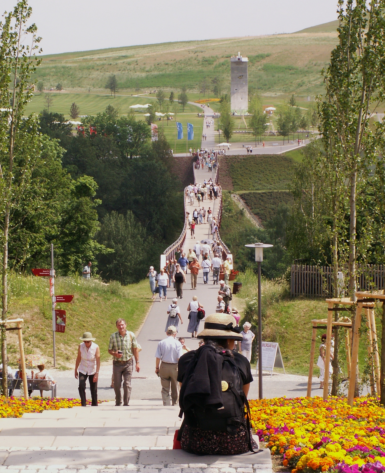 Gera Ronneburg BUGA 07 - Neue Landschaft Ronneburg Renaturierung Uranerzabbauregion Wismut Foto 2007 Wolfgang Pehlemann Wiesbaden PICT0251